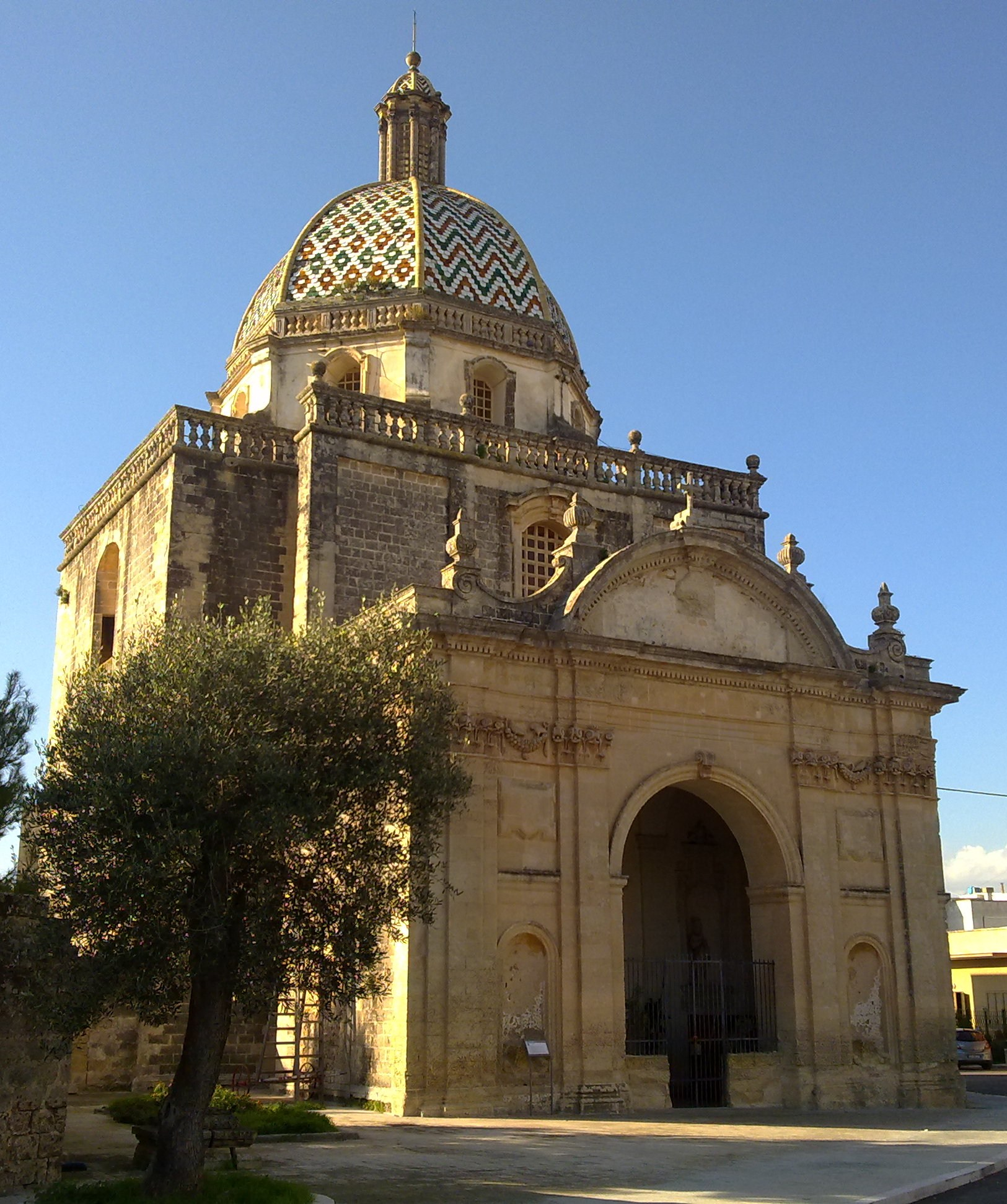 Chiesa San Nicola Lequile, Lecce